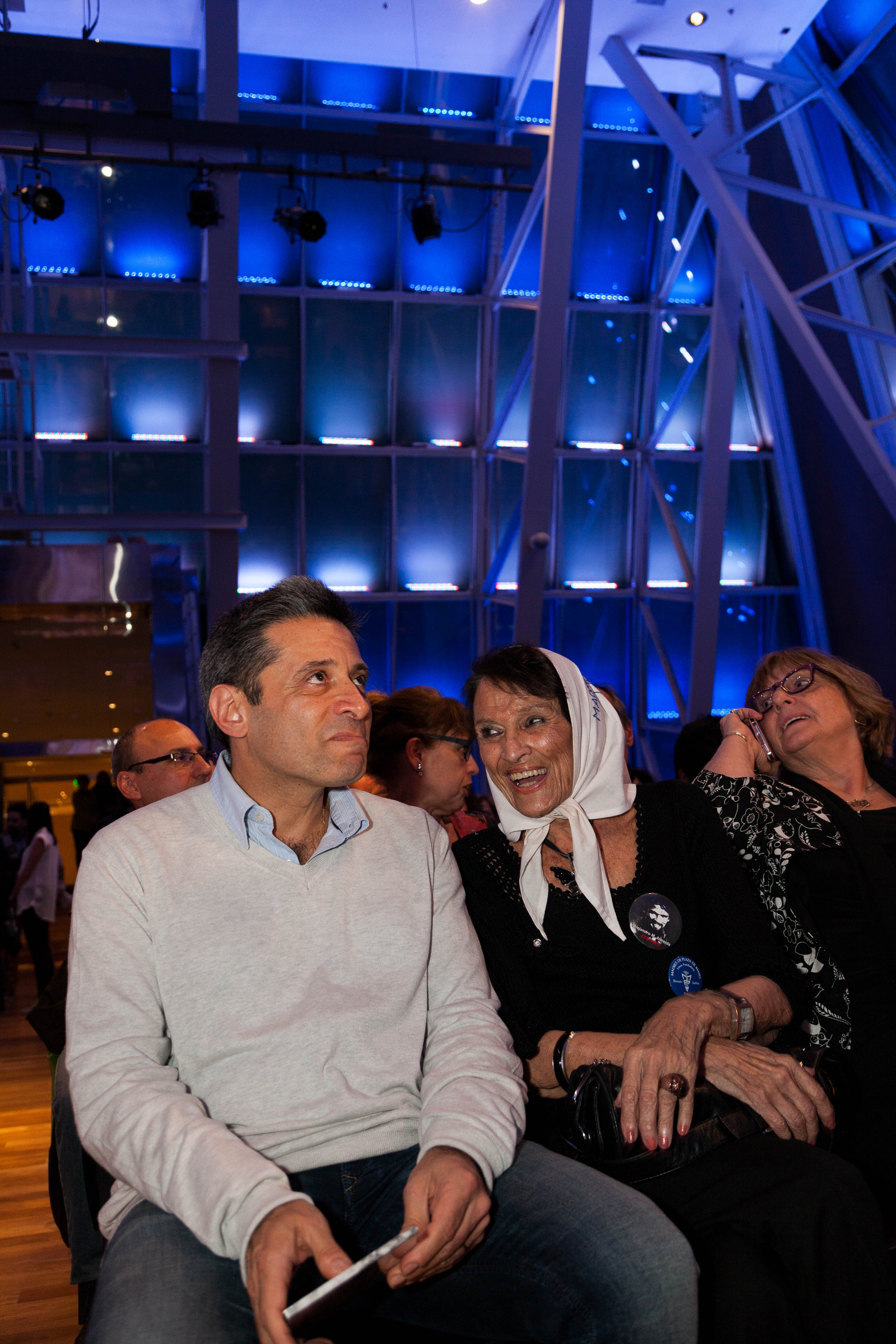 Víctor Santa María junto a Taty Almeida (integrante de Madres de Plaza de Mayo Línea Fundadora), en el Centro Cultural Kirchner durante la entrega de los Premios Democracia 2015.